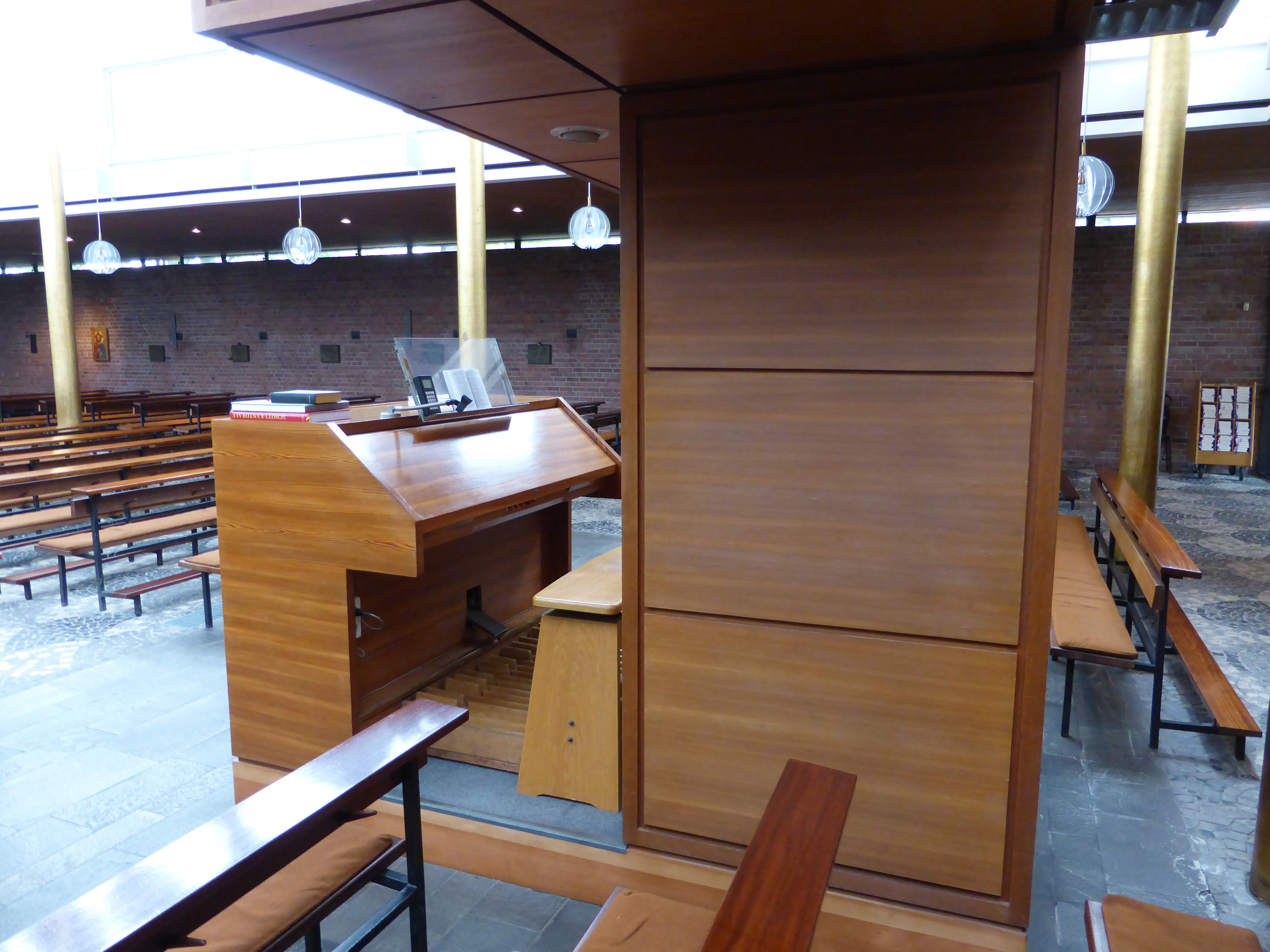 Johannes Klais Orgel, St. Stephan, Köln